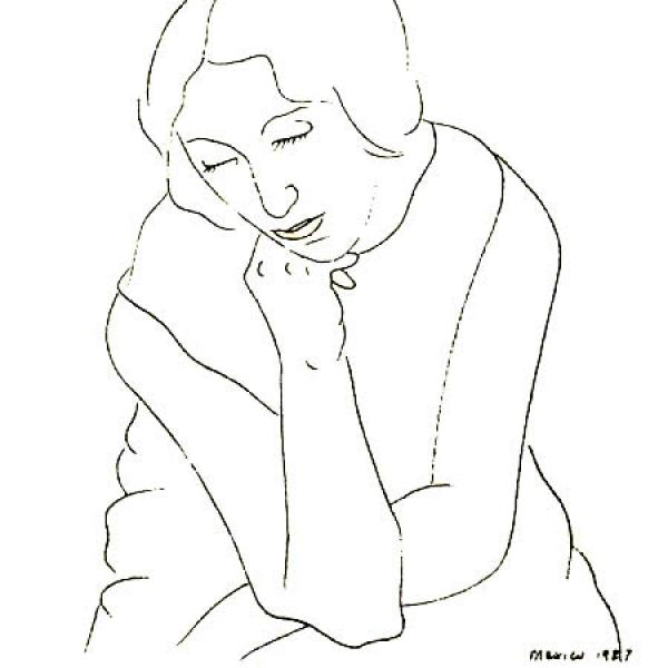 A modelo, 1927. Un dos moitos retratos que Francisco Miguel fixo de Syra Alonso